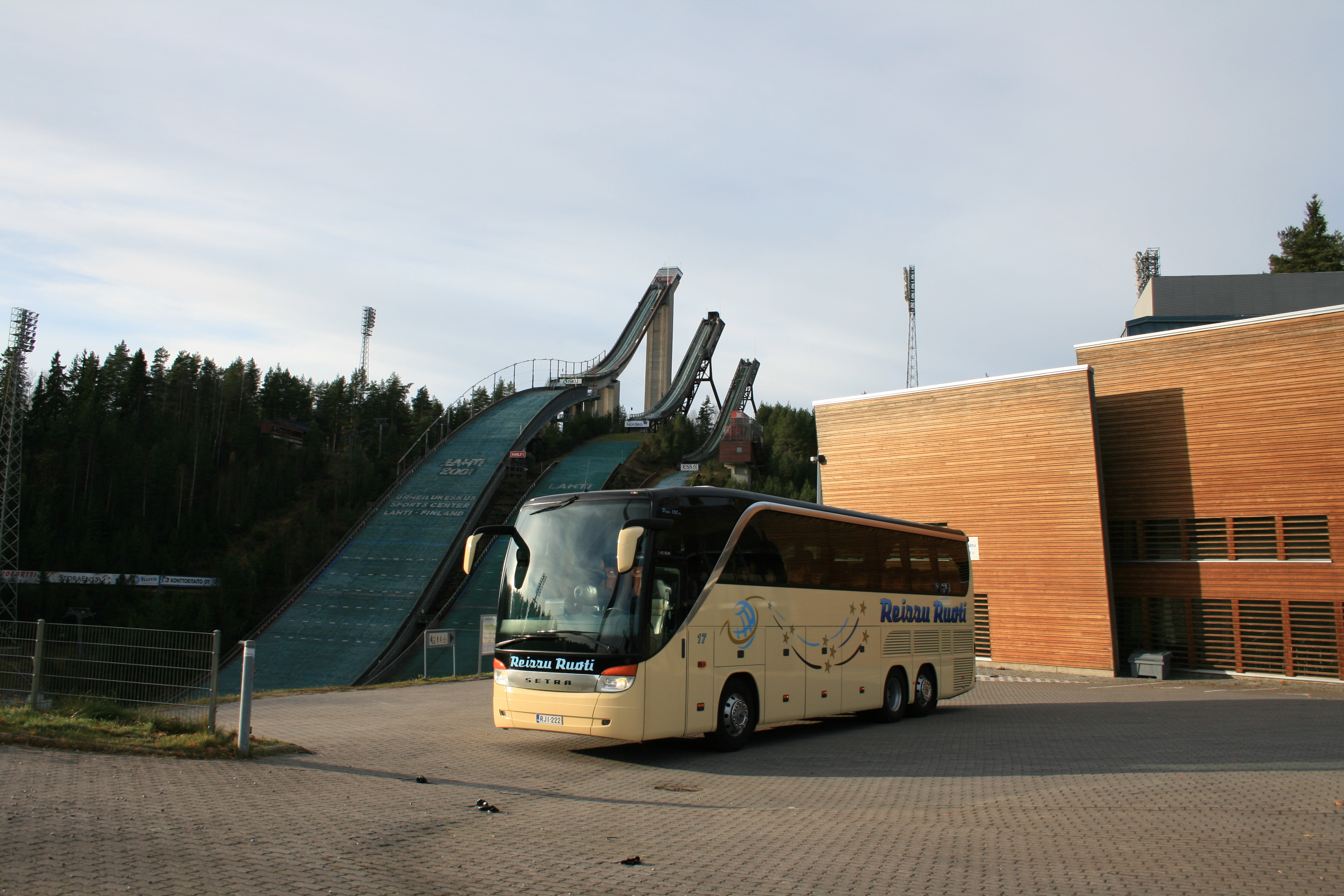 Kuva on otettu vuonna 2009, Lahti Urheilukeskus.